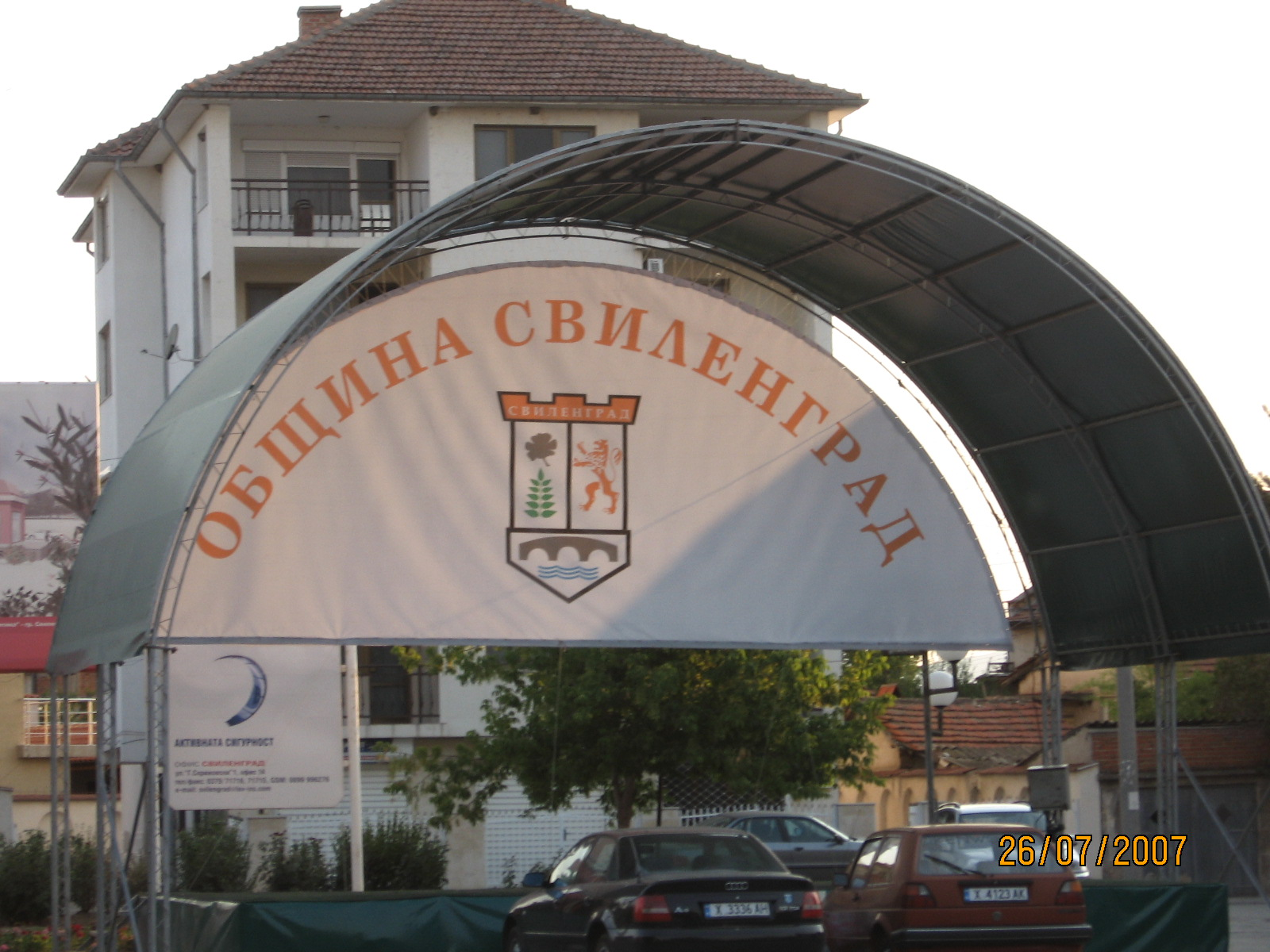 Armoiries de l'obština de Svilengrad.